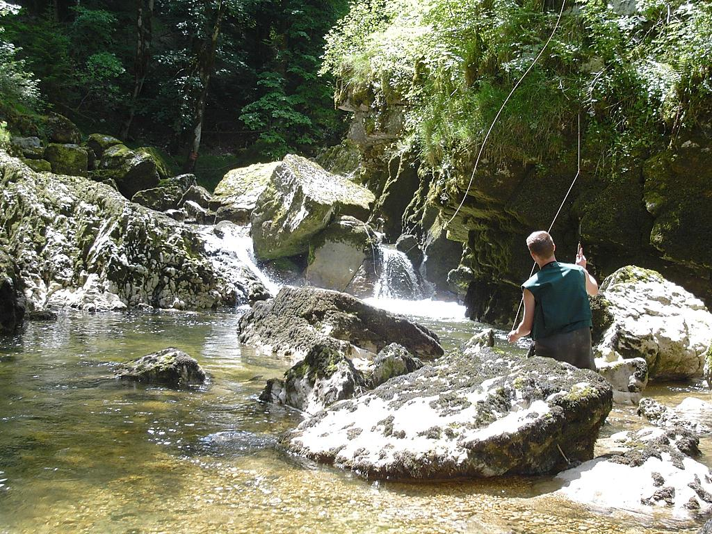 pêche à la mouche photo perso licence GFDL mai 2003 saine (39) Utilisateur:Liondelyon mai 2003